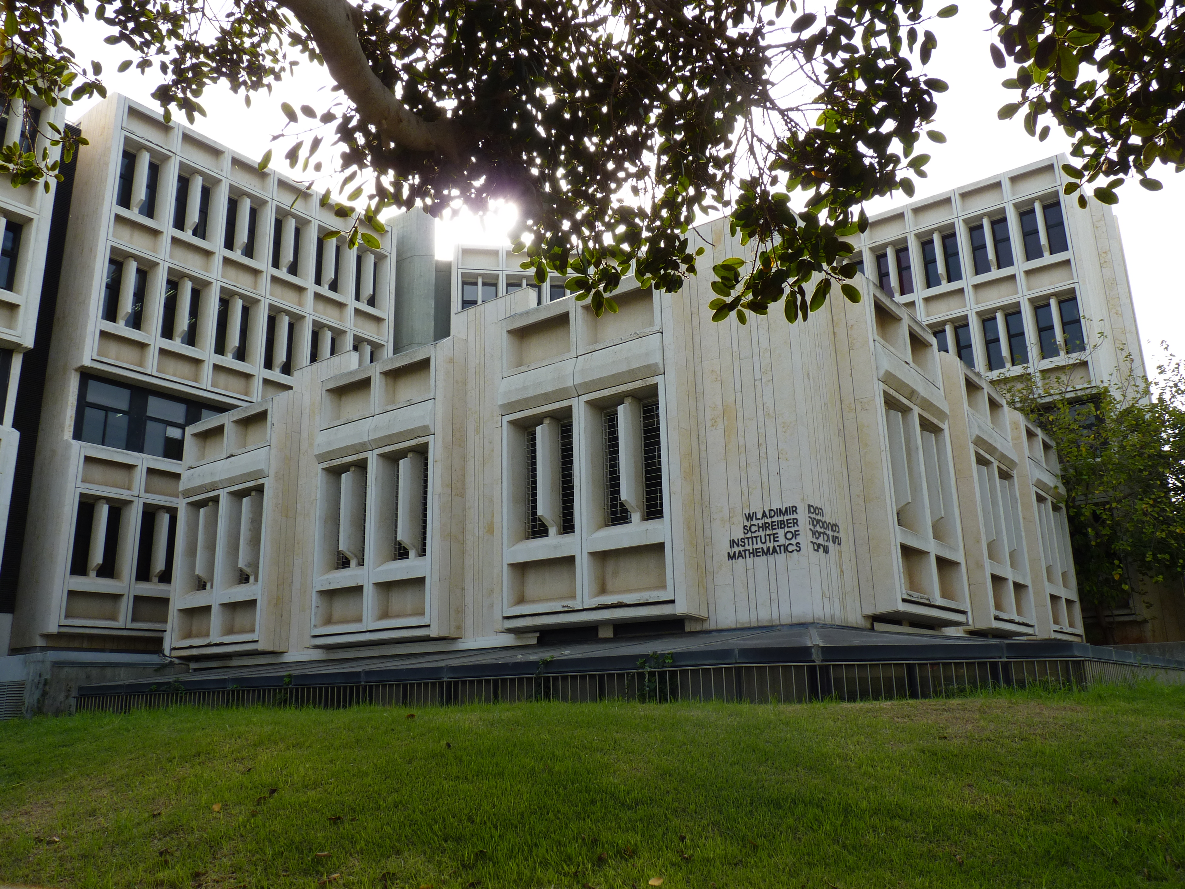 P1100381 Tel Aviv-Yafo